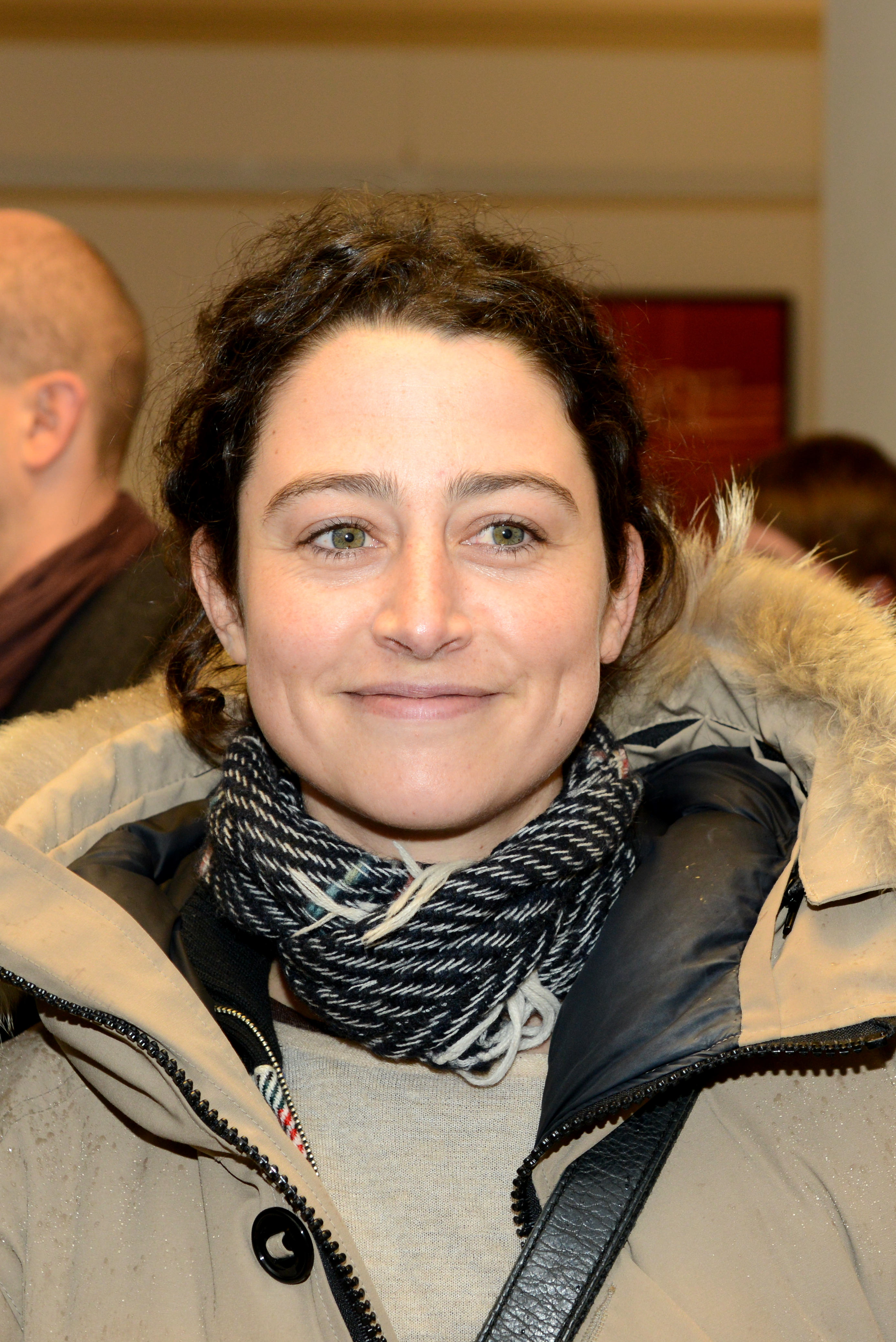 D'Filmregisseurin Laura Schroeder, Februar 2014.